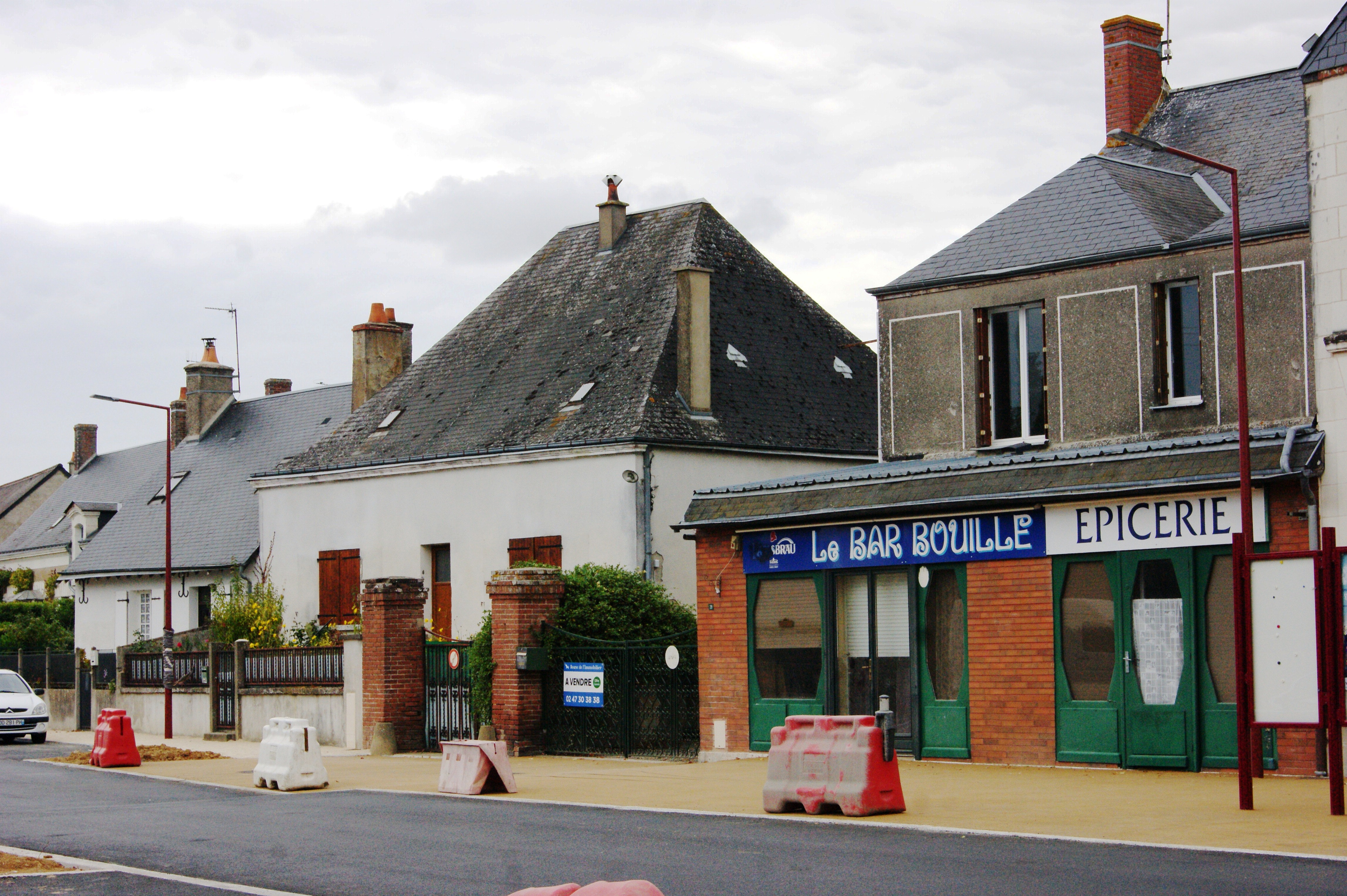 Ancien bar de Montreuil-en-Touraine fermé depuis décembre 2012.